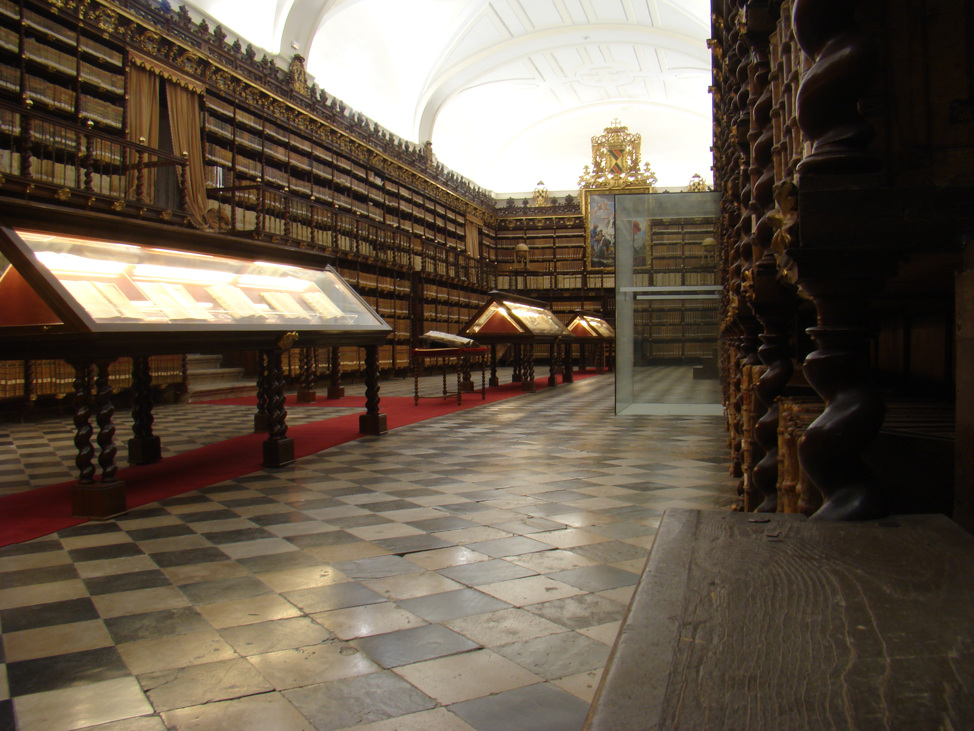 Vista de la Biblioteca del Colegio Mayor de Santa Cruz en la ciudad de Valladolid, España.